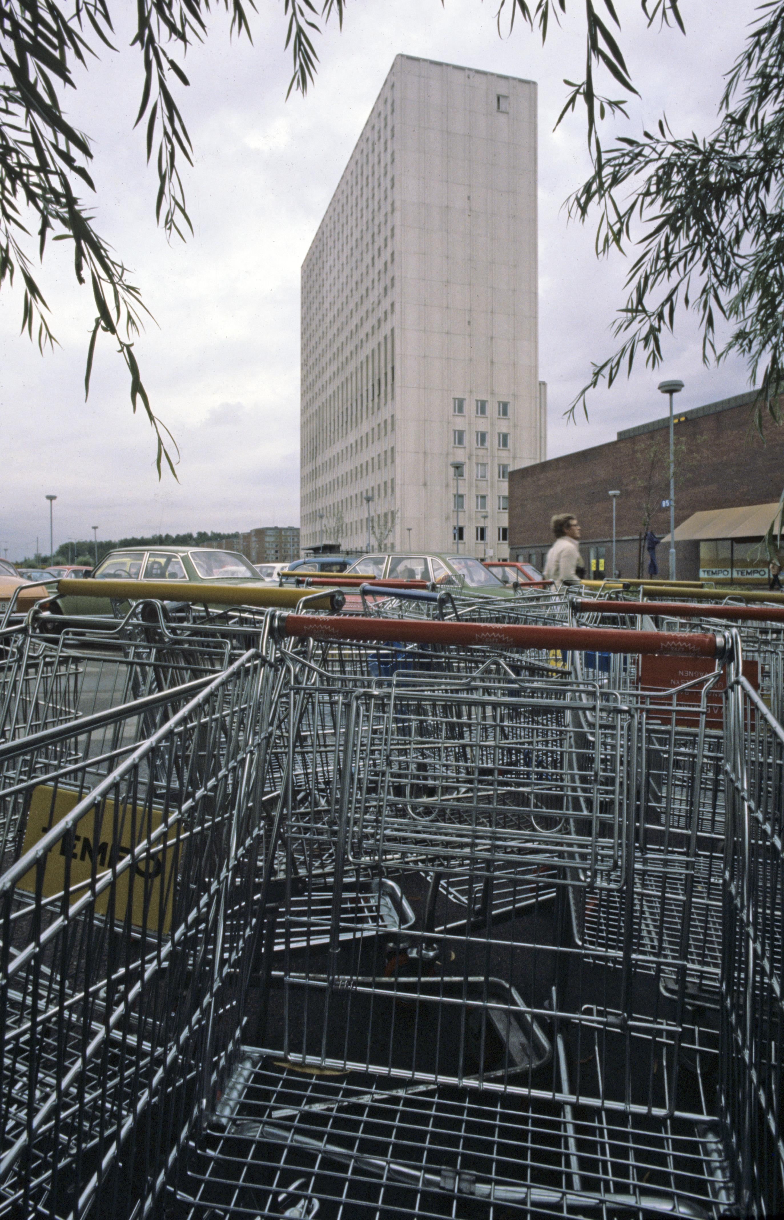 Kundvagnar, i bakgrunden köpcentret. Motiv: Frölunda torg Nyckelord: Riksintressen Kategori: Stadsmiljö Kundvagnar, i bakgrunden köpcentret.